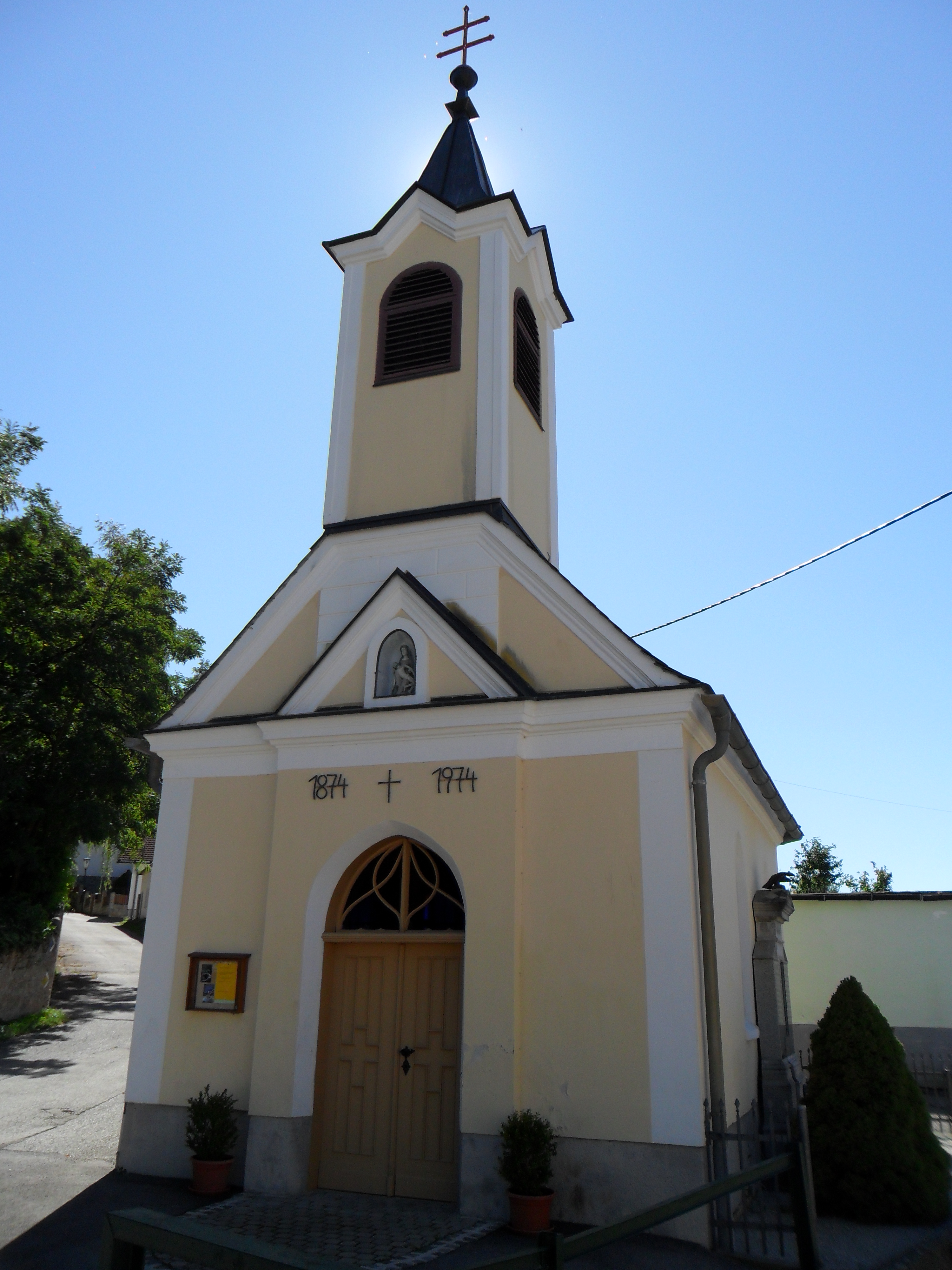 Ortskapelle in Ramplach (Gemeinde Wartmannstetten)